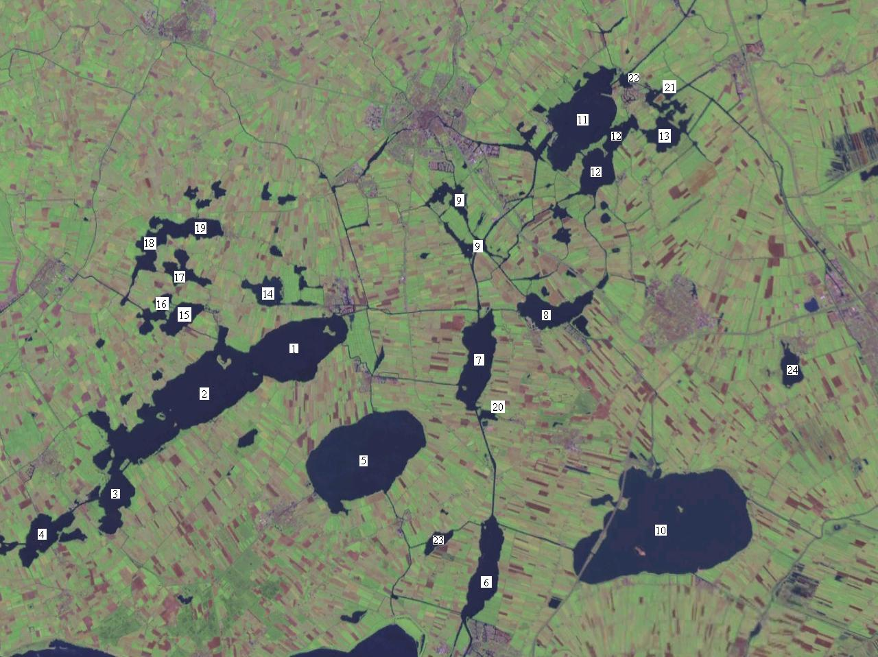 De Fryske marren. De Lytse Griene is it T-foarmige eilân tusken de Snitser Mar(11) en de Goaiïngarypster Puollen(12). De Fryske marren yn de Súdwesthoeke.